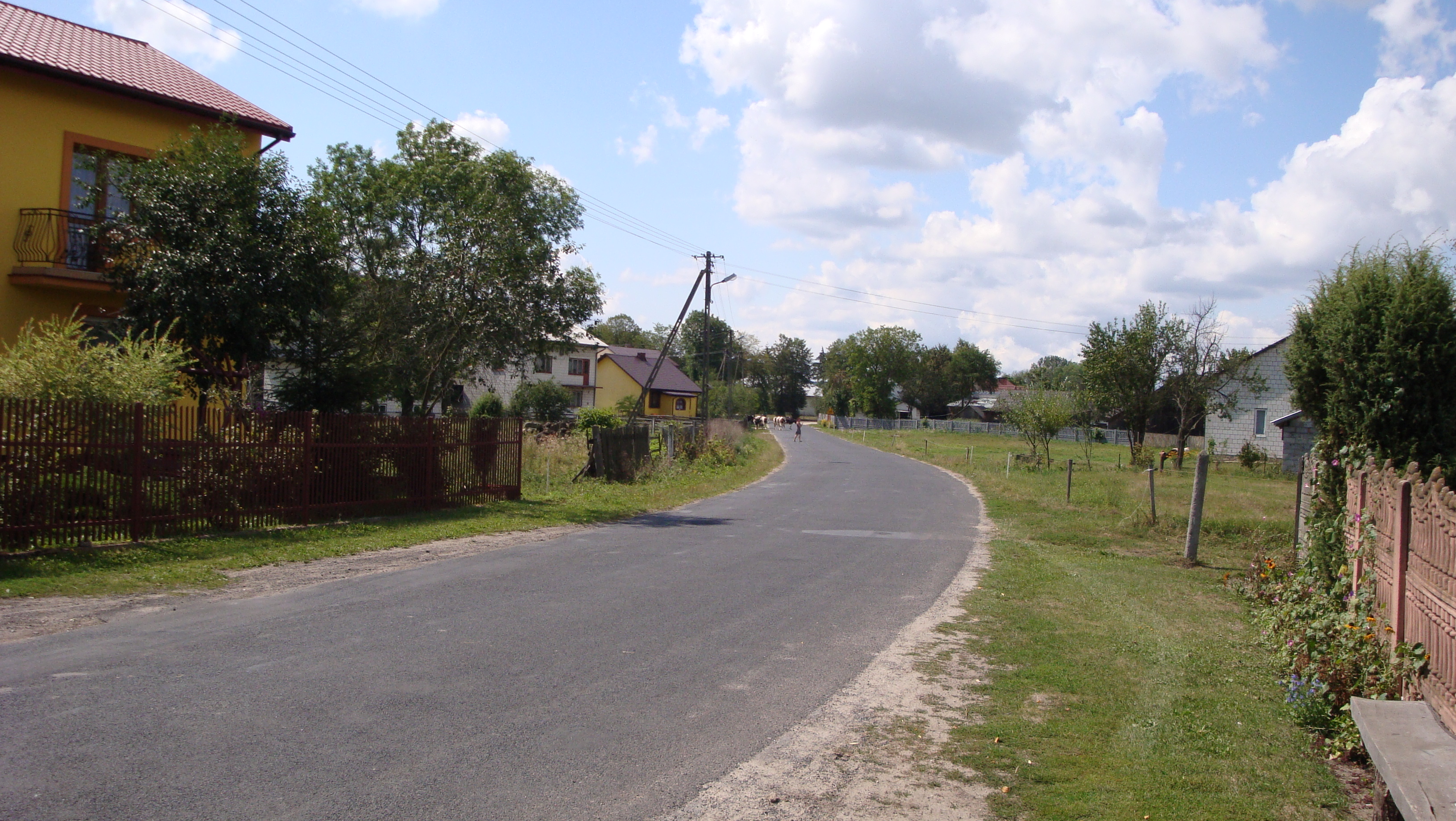 Widok na Radwanów